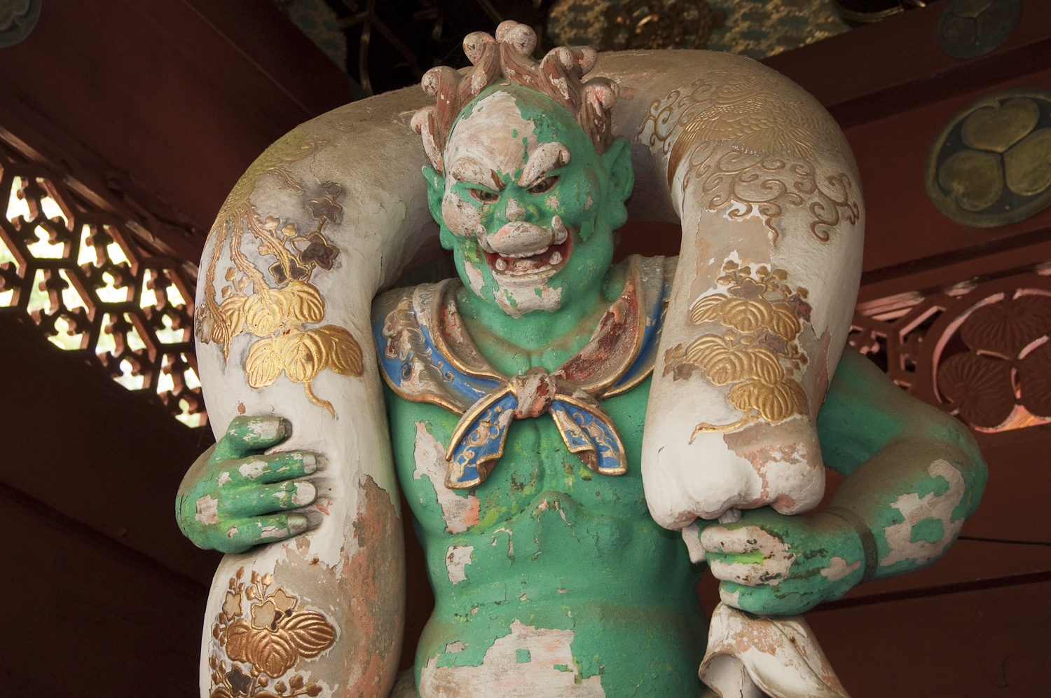 Fūjin 風神 at Taiyū-in Reibyō, Nikkō, Japan.